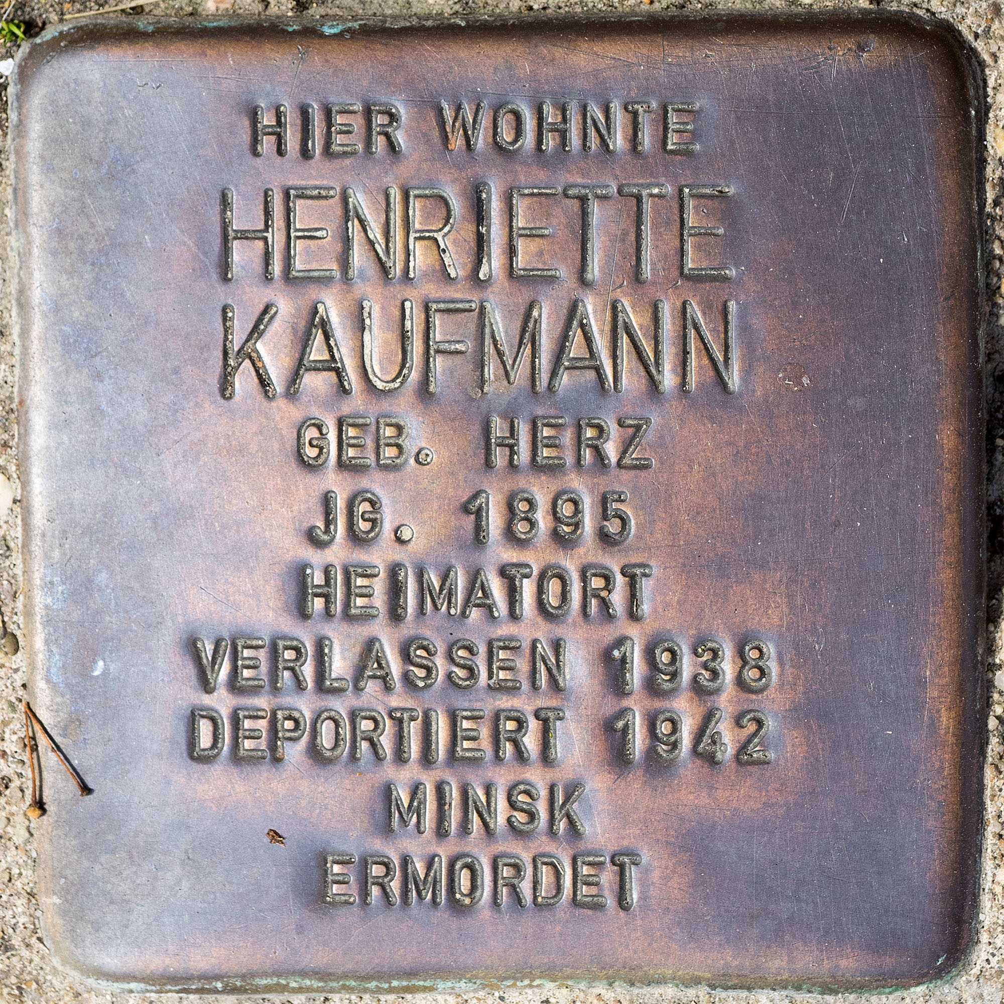 Stolpersteine Roki: Kaufmann, Henriette